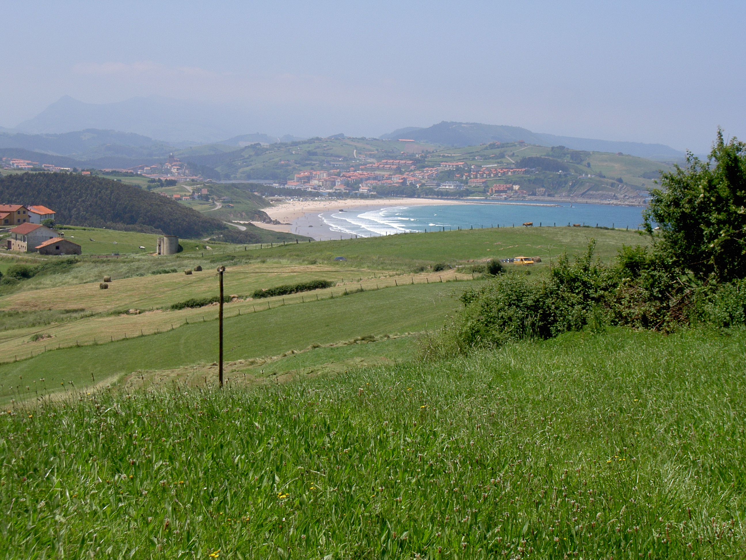 San Vicente de la Barquera von Osten